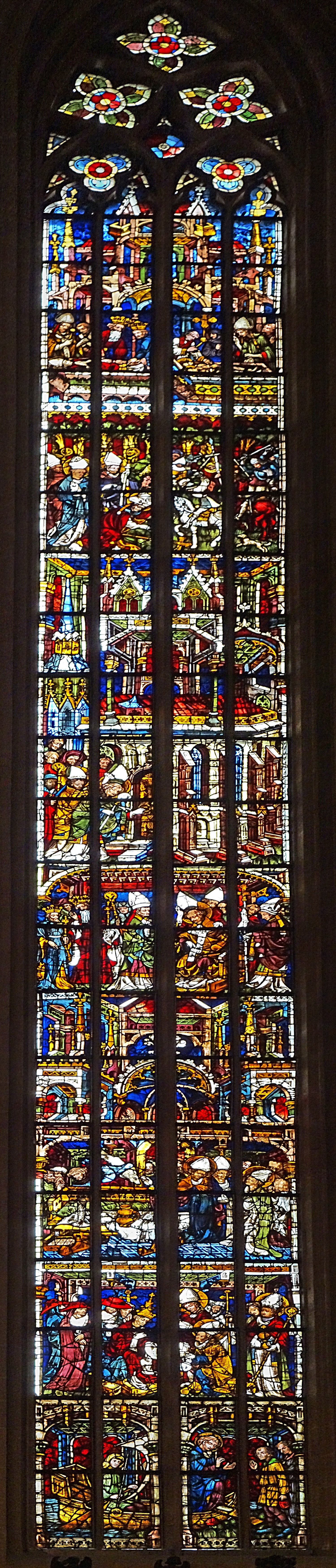 Bonifatiusfenster (nVII) im Hohen Chor des Erfurter Doms St. Marien